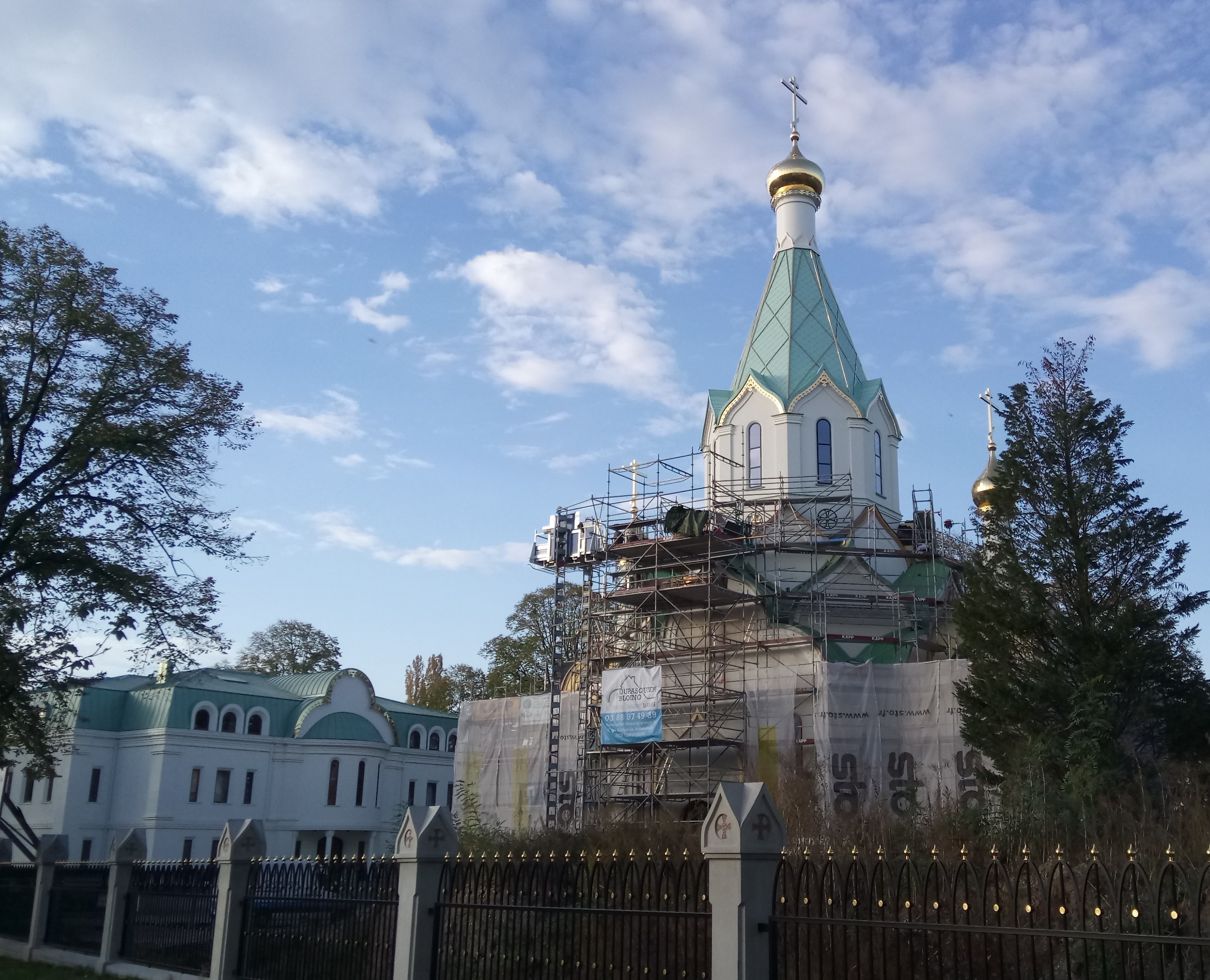 L'église russe de Strasbourg, octobre 2017.